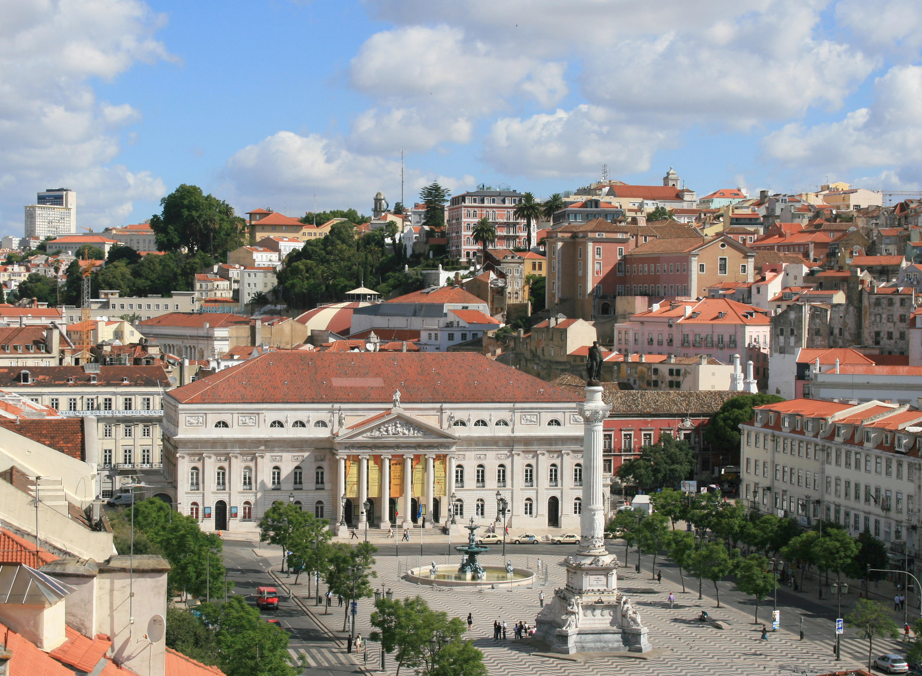 Rossio - Praca Dom Pedro IV - Lisbon